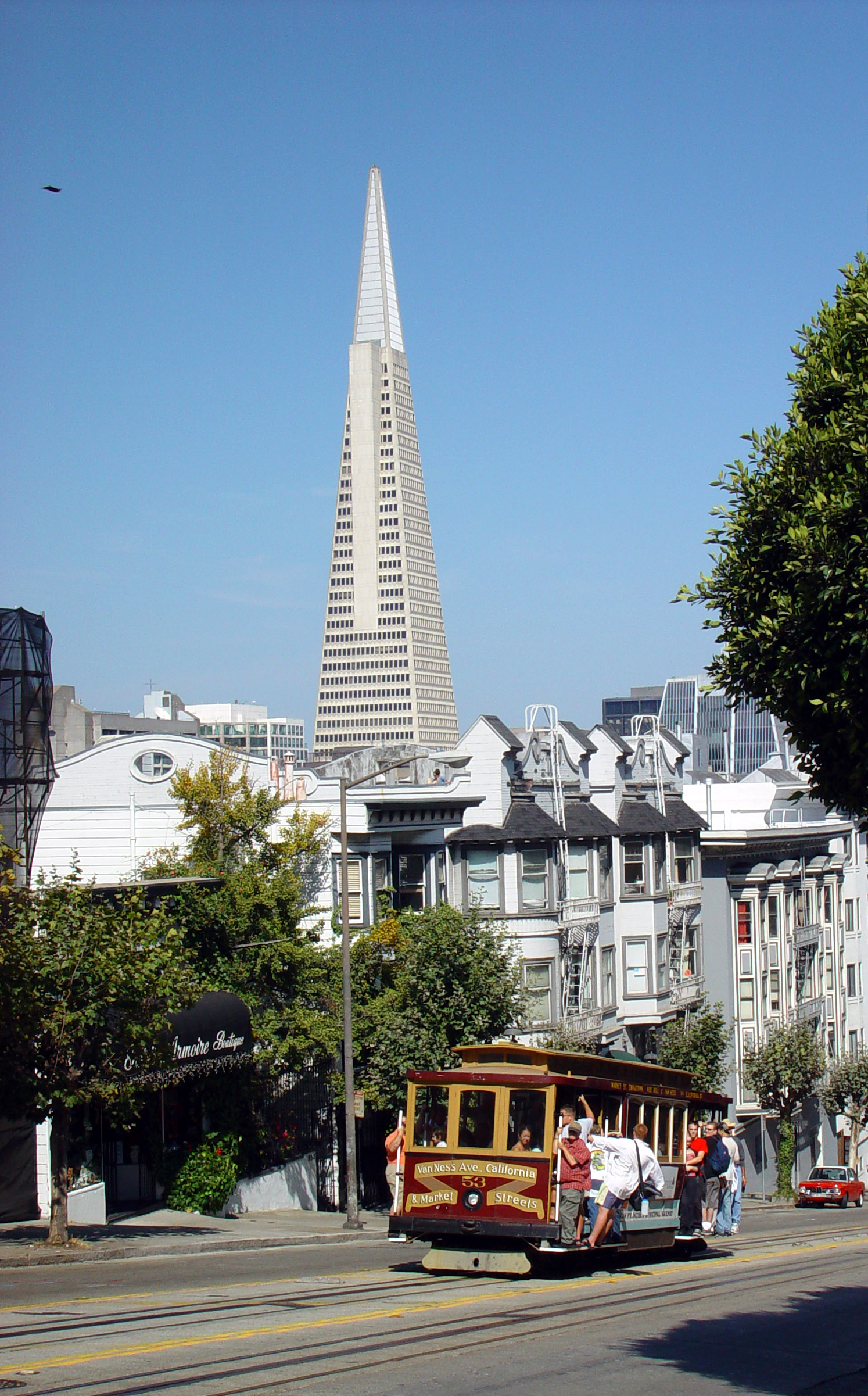 Transamerica Pyramid, Cable Car, San Francisco, California